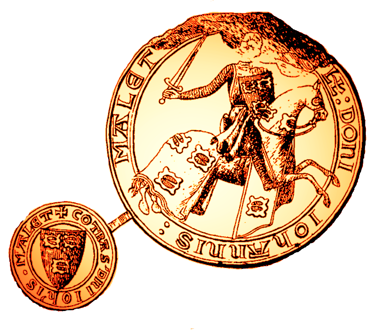 Sceau de Jean Malet, XIIIe siècle (image du domaine public modifiée)